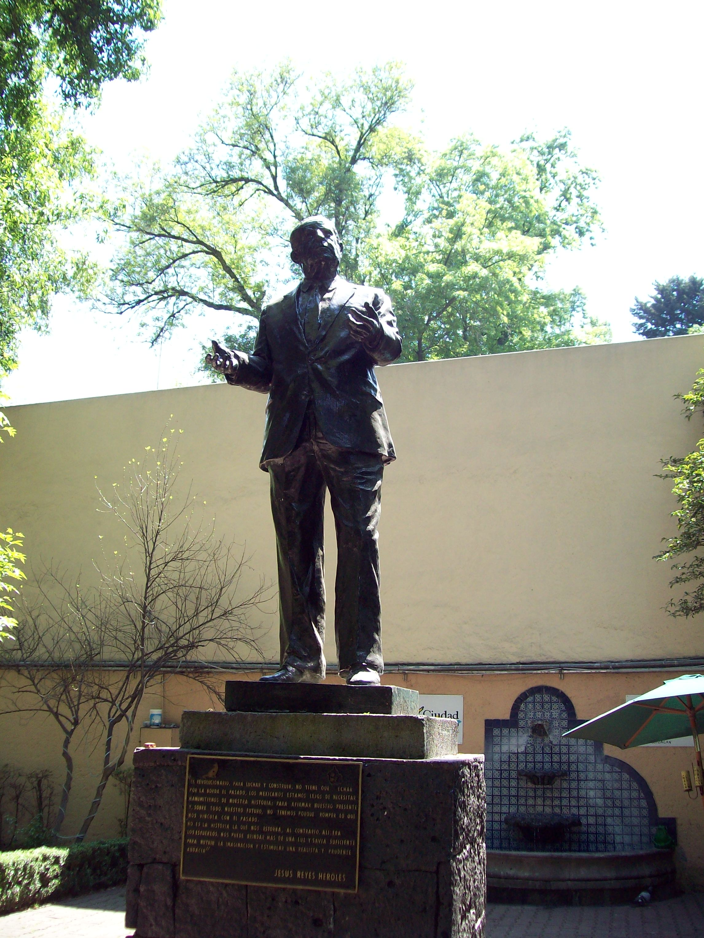 Estatua de Jesús Reyes Heroles, en la Casa de la Cultura Jesús Reyes Heroles. Coyacán, Ciudad de México.